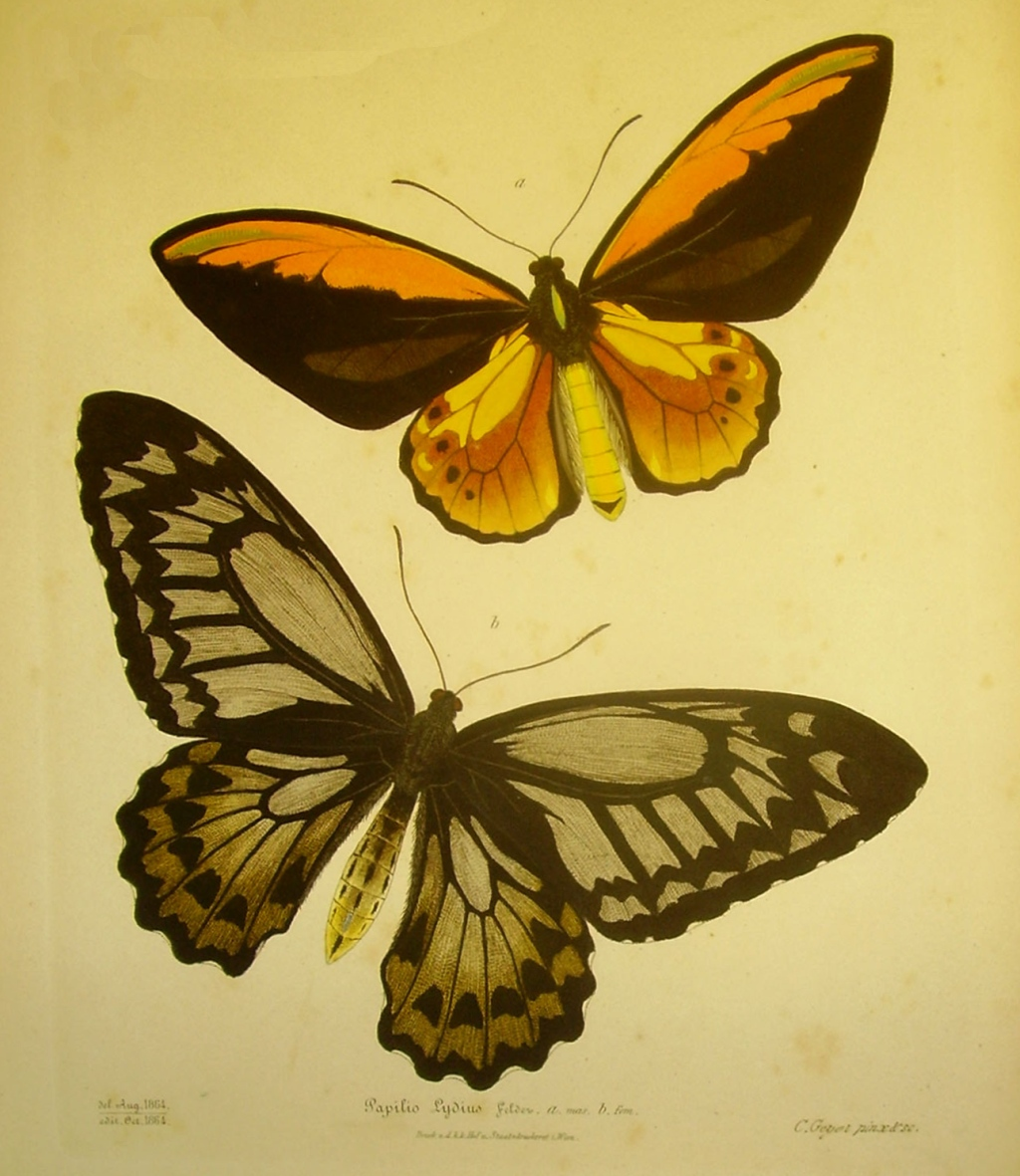 Papilio lydius = Ornithoptera croesus lydius